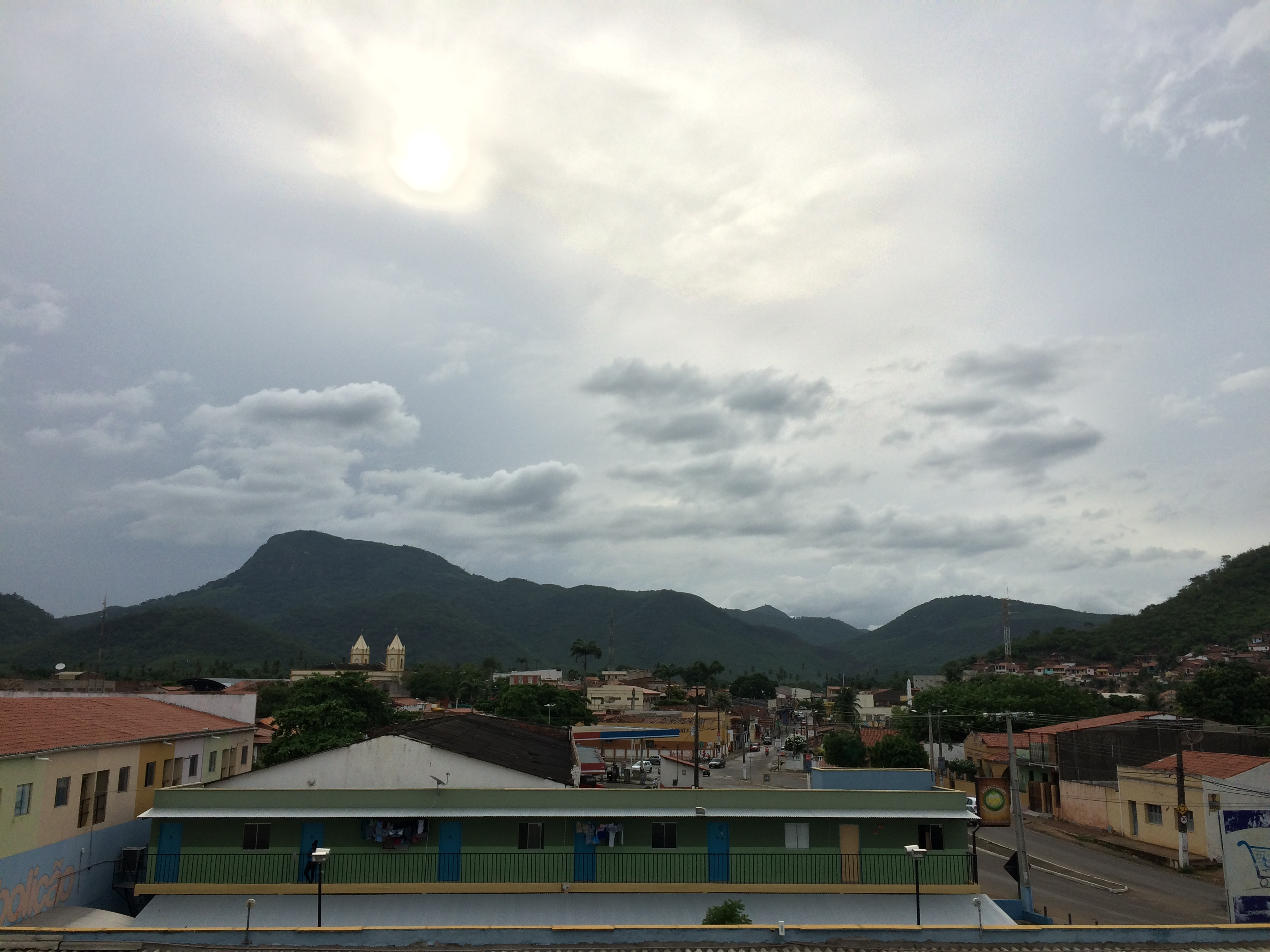 cidade